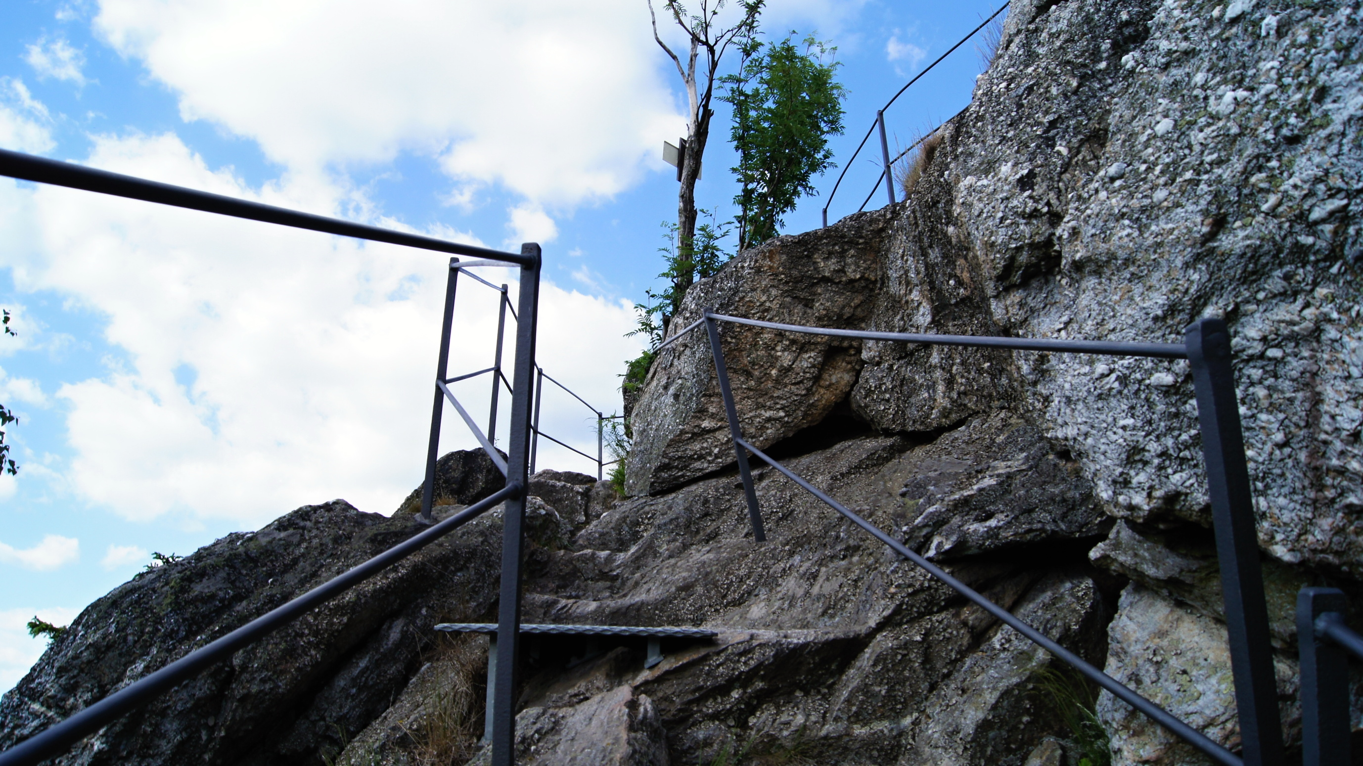 bradlo